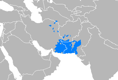 Idioma baluchi